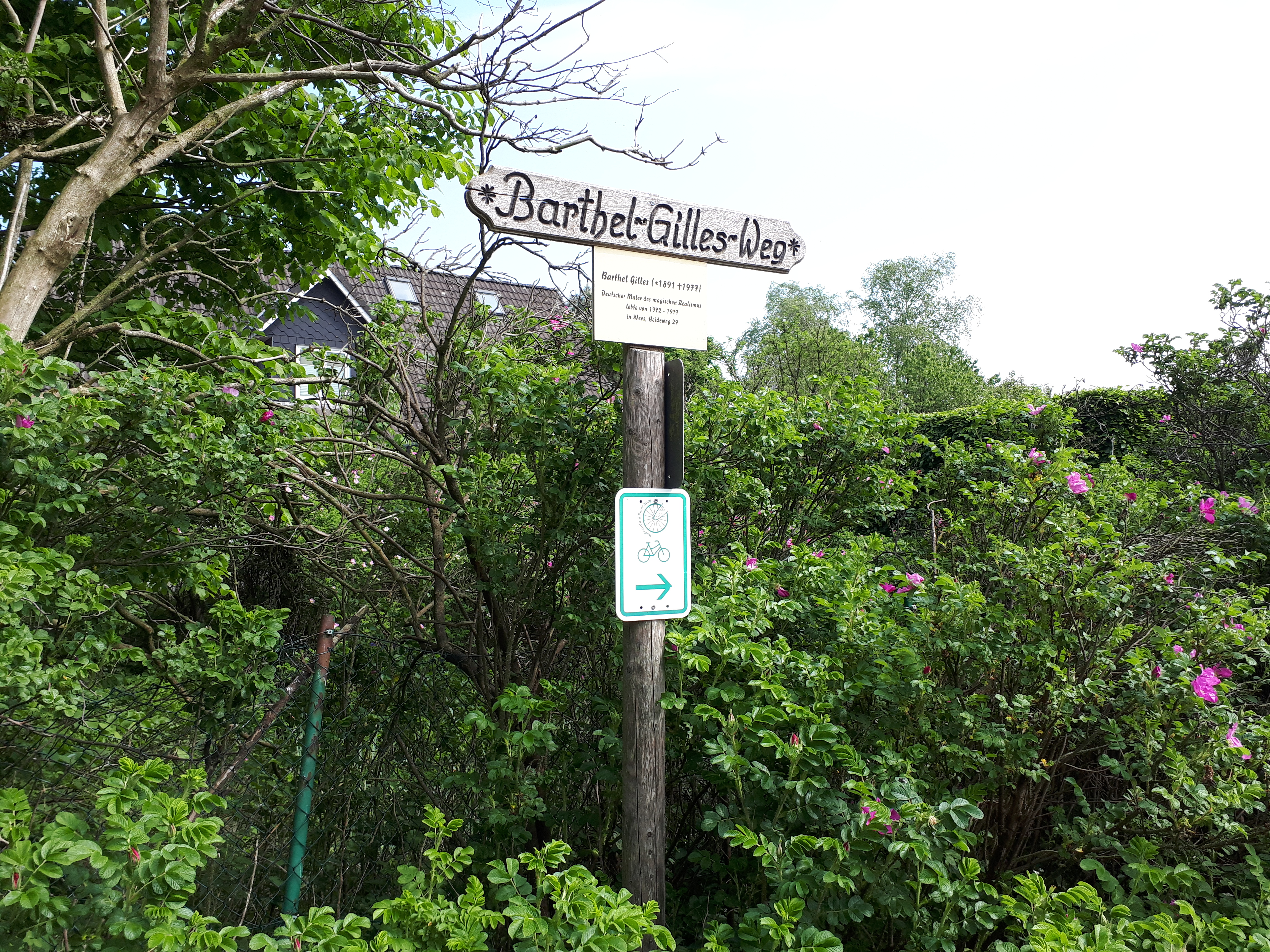 Straßenschild zum Barthel-Gilles-Weg in Wees, die nach dem Künstler benannt wurde, der einige Meter weiter zuletzt wohnhaft war. (Die GPS des Barthel-Gilles-Weges lautetː 54.801599, 9.510182; Der Weg führt zum Weesrieser Gehölz)